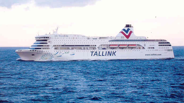 Victoria I